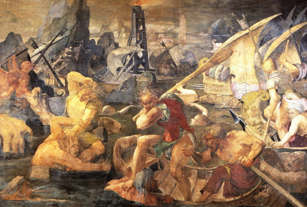 Galleria di Francesco I, vendetta di nauplio